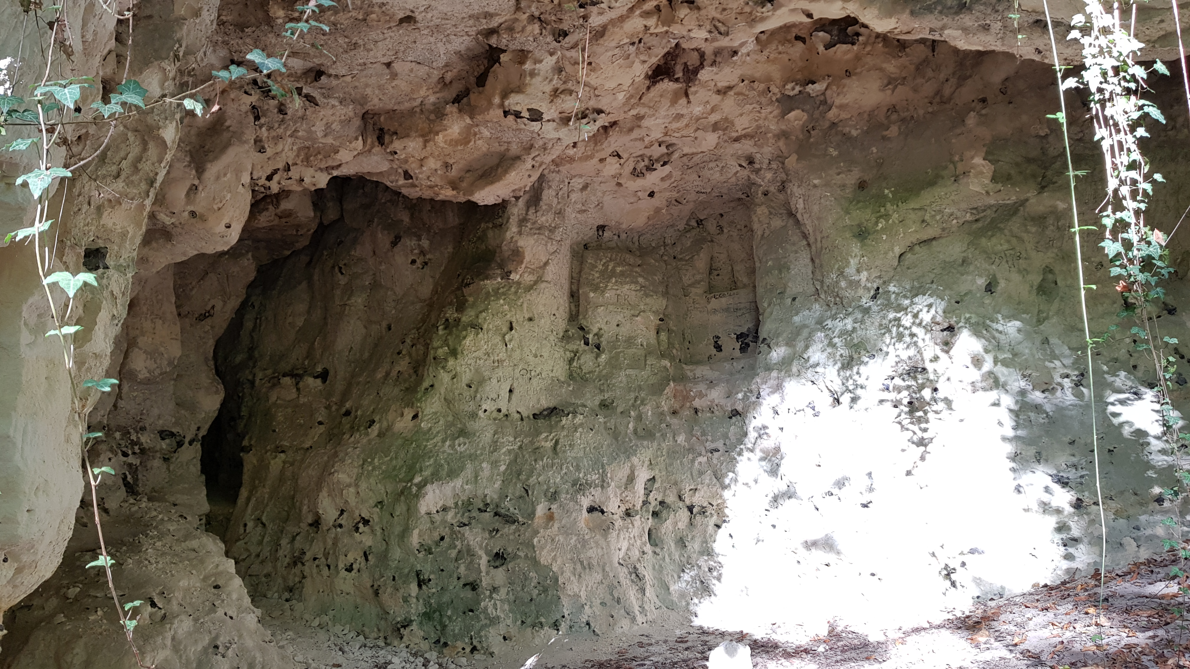 Abri van Rijckholt in Savelsbos, Rijckholt, Nederland